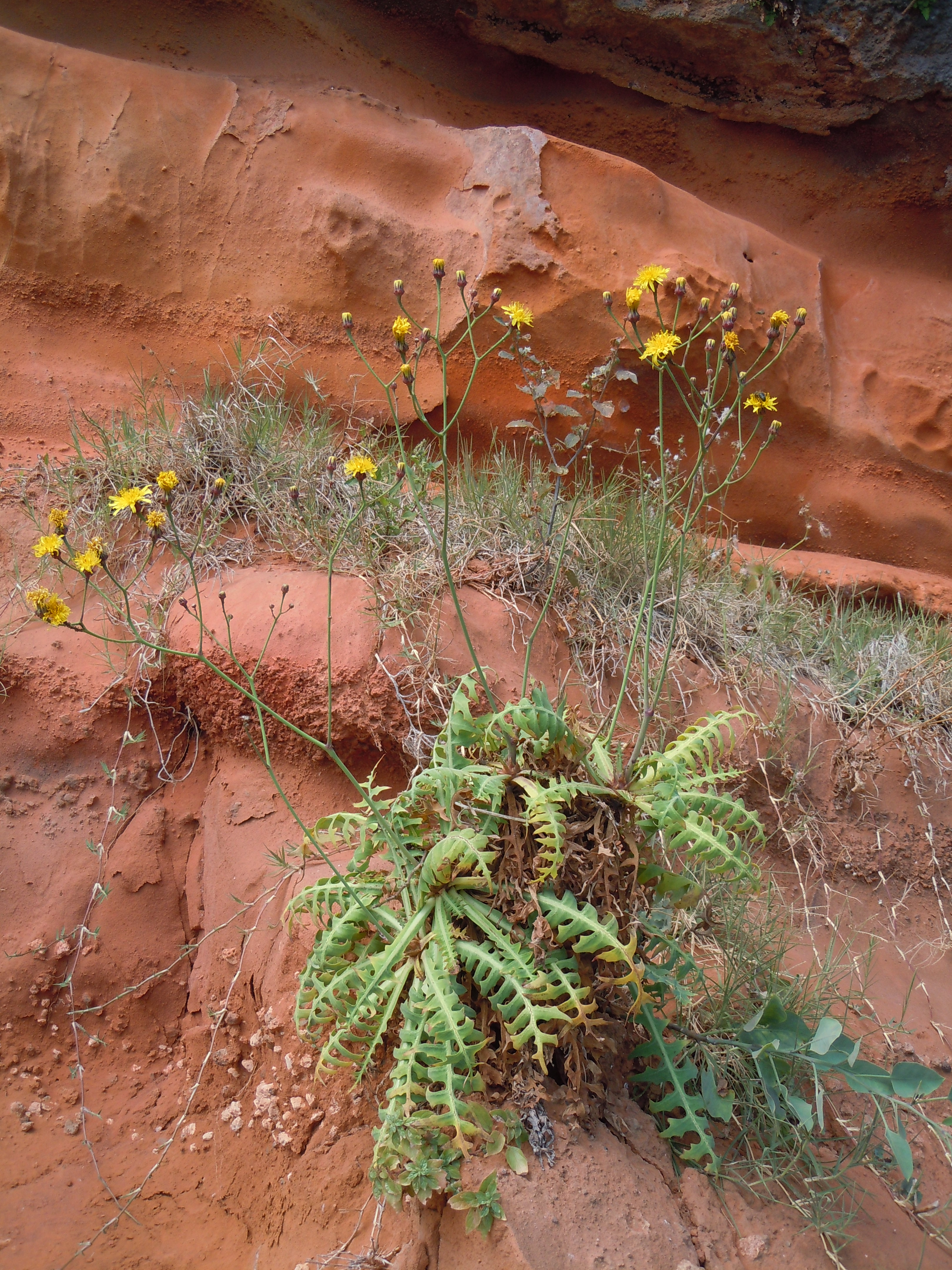 Sonchus ustulatus subsp. ustulatus, Câmara de Lobos, Madère